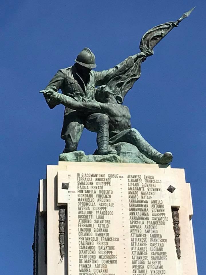 Monumneto ai Caduti di Angri